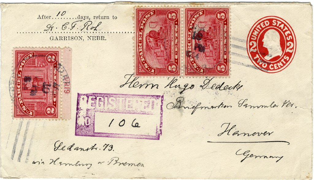 Eine Paketkarte des US Parcel Service frankiert mit einer 2 Cent, 2x 5 Cent Marke der ersten Paketmarkenserie auf einer Ganzsache zu 2 Cent = 14 Cent von Garrisson Nebraska an den Briefmarken Sammlerverein in Hannover, Niedersachsen. Die Sendung war als Eingeschreiben gelaufen.